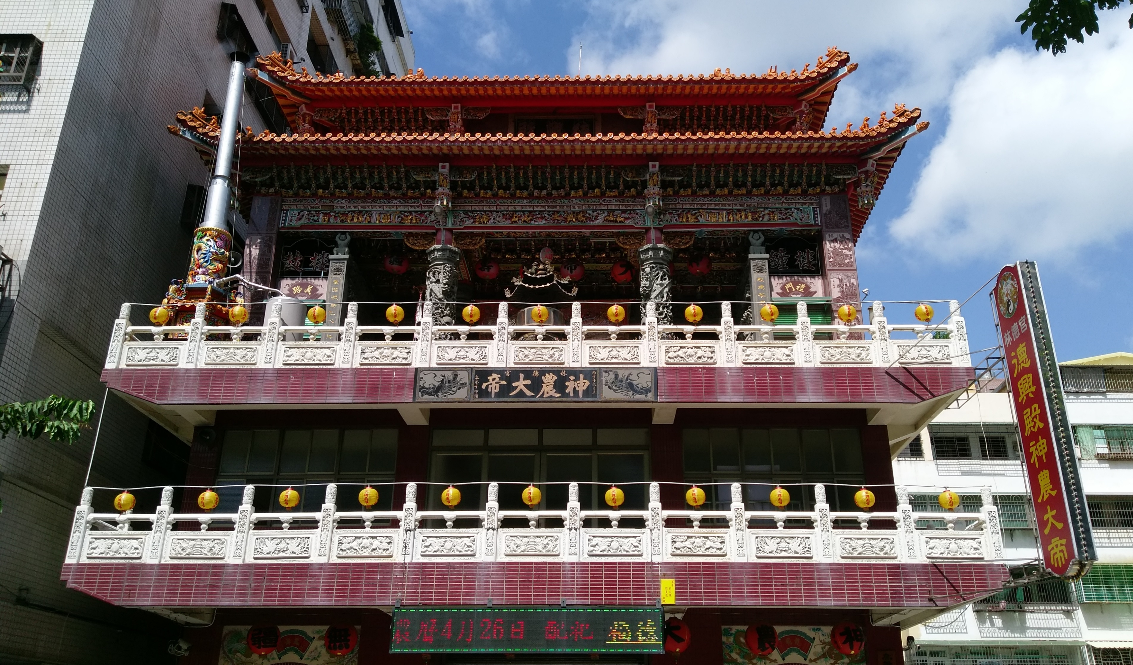 中文（台灣）: 林德官德興殿廟貌